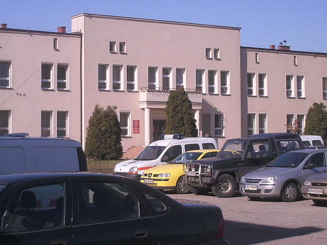 Gliwice - budynek dawnego sztabu Górnośląskiej Brygady WOP